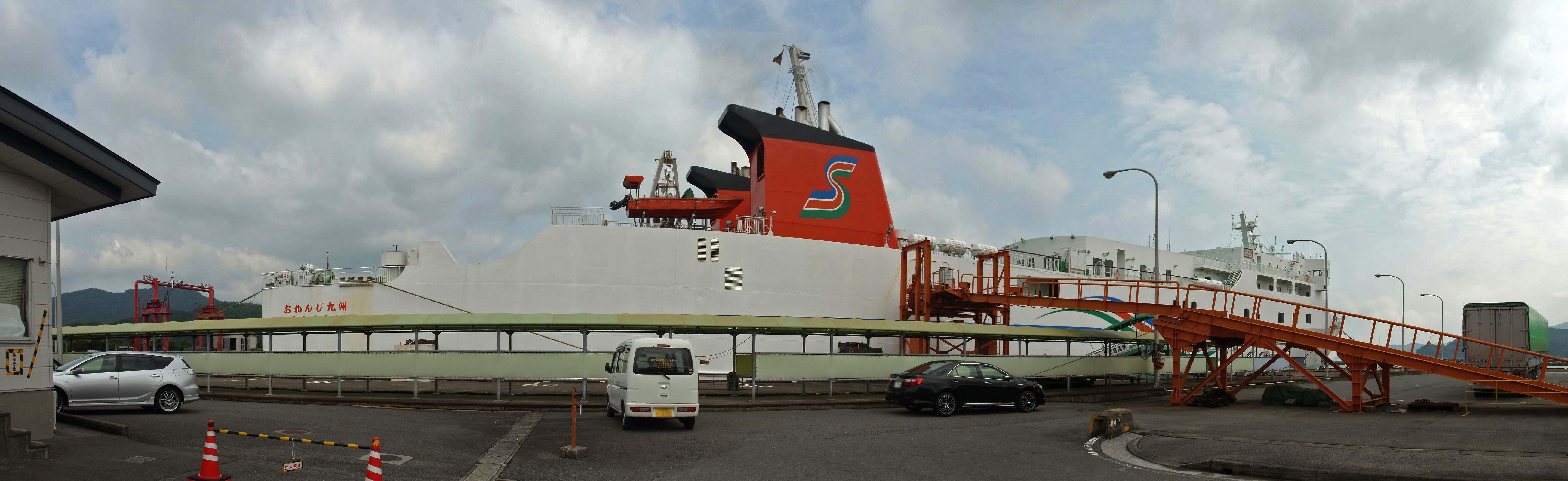 Usuki port Ferrie terminal , 臼杵港フェリーターミナル